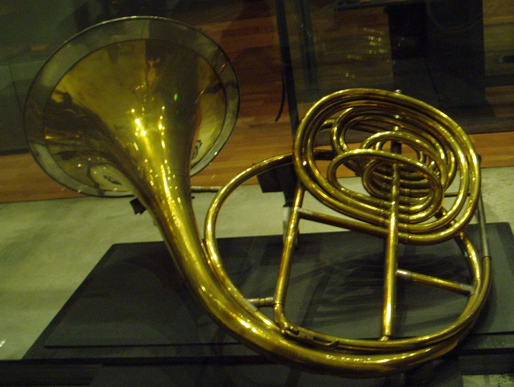 Omnitonic Horn - Charles Joseph Sax, Bruxelles, 1826 - Paris, Musée de la musique